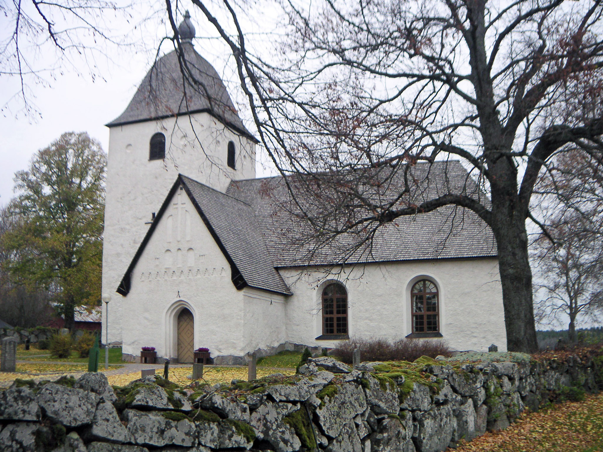 Kulla kyrka